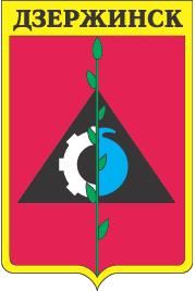 Герб города Дзержинск